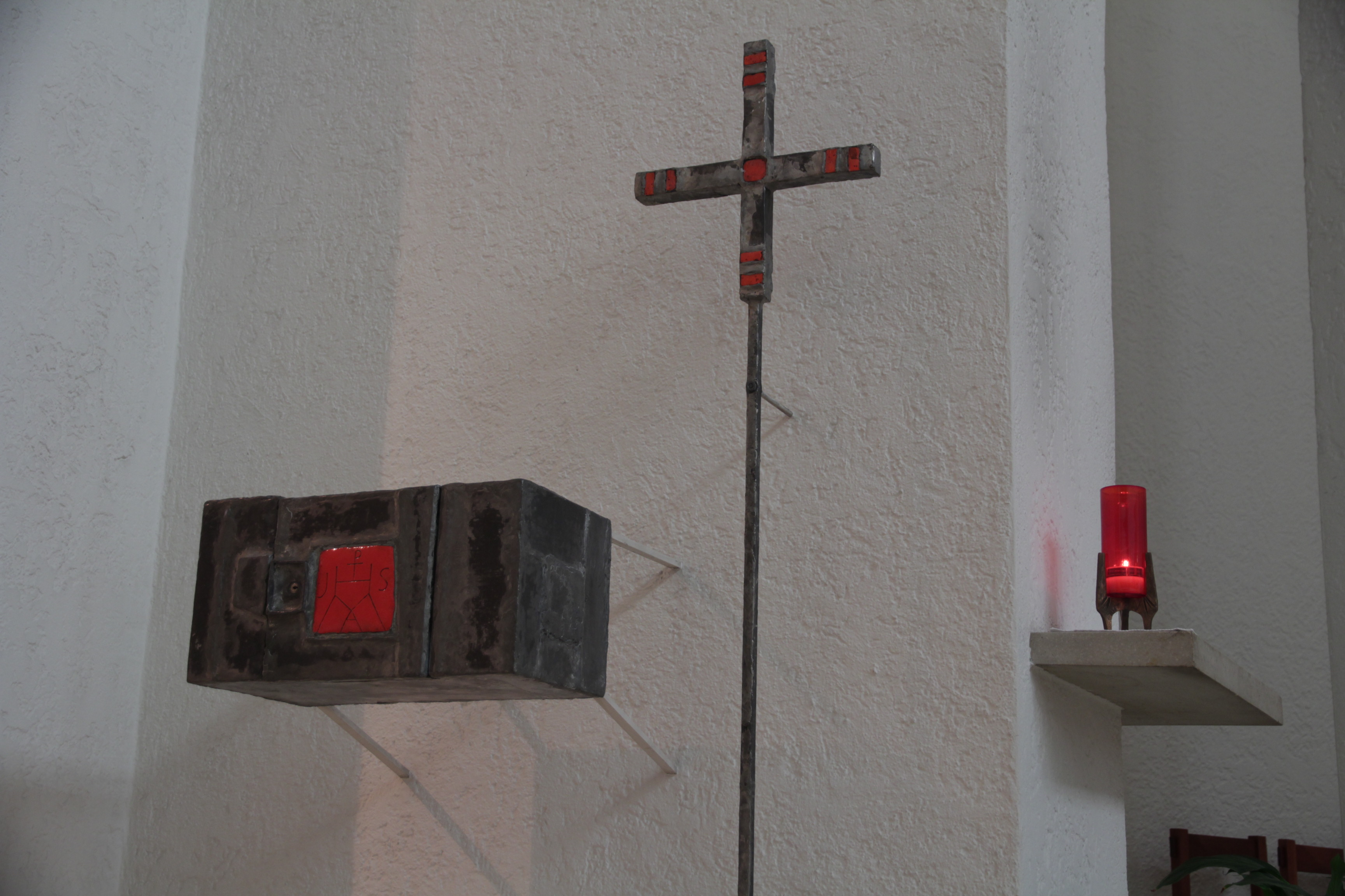 Römisch-katholische Pfarrkirche Bruder Klaus Zürich-Unterstrass, Tabernakel von Alfred Huber